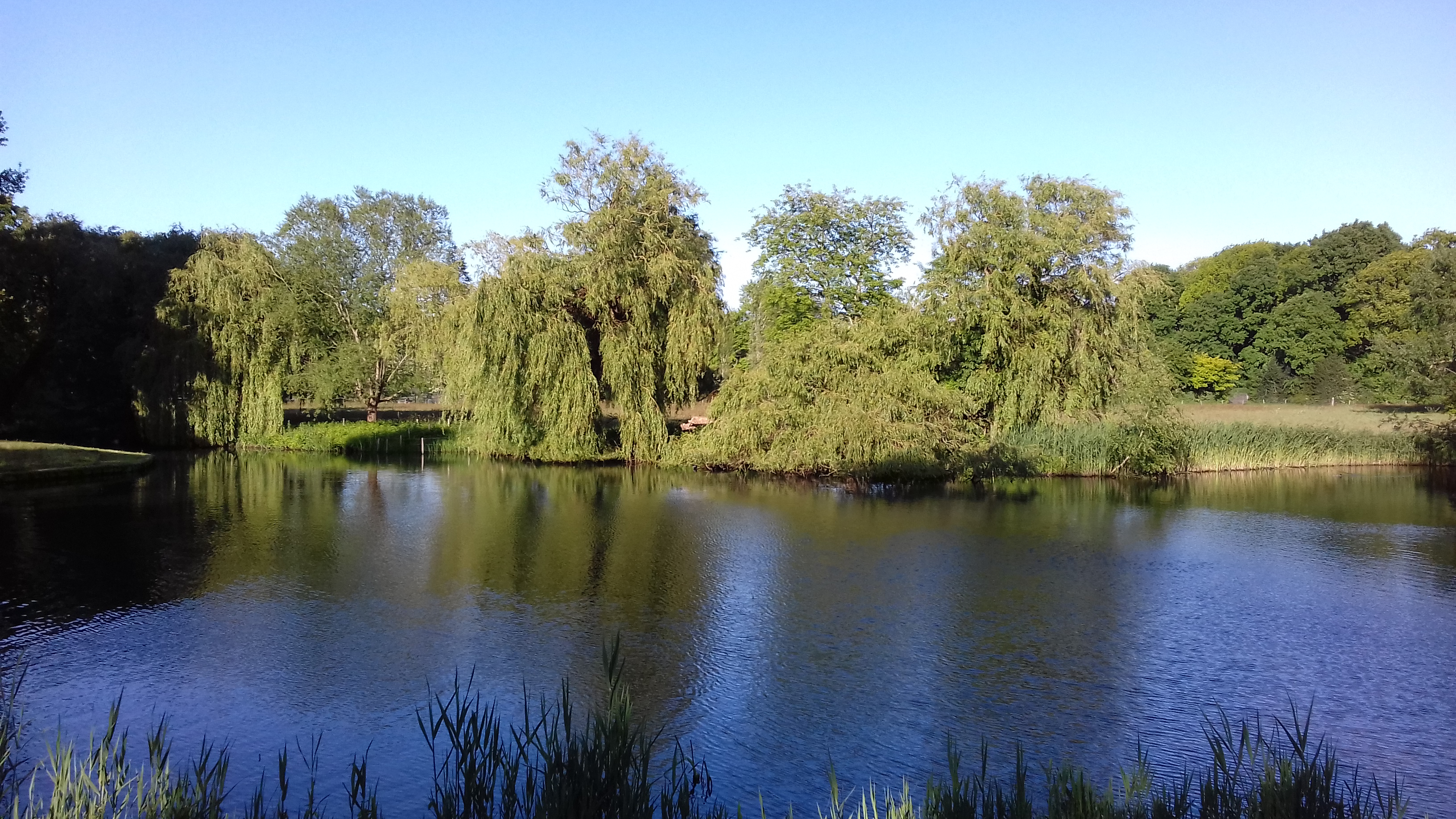 Foto genomen van de kant Frederik van Eden weg richting oosten, zwaaikom 't Mouwtje